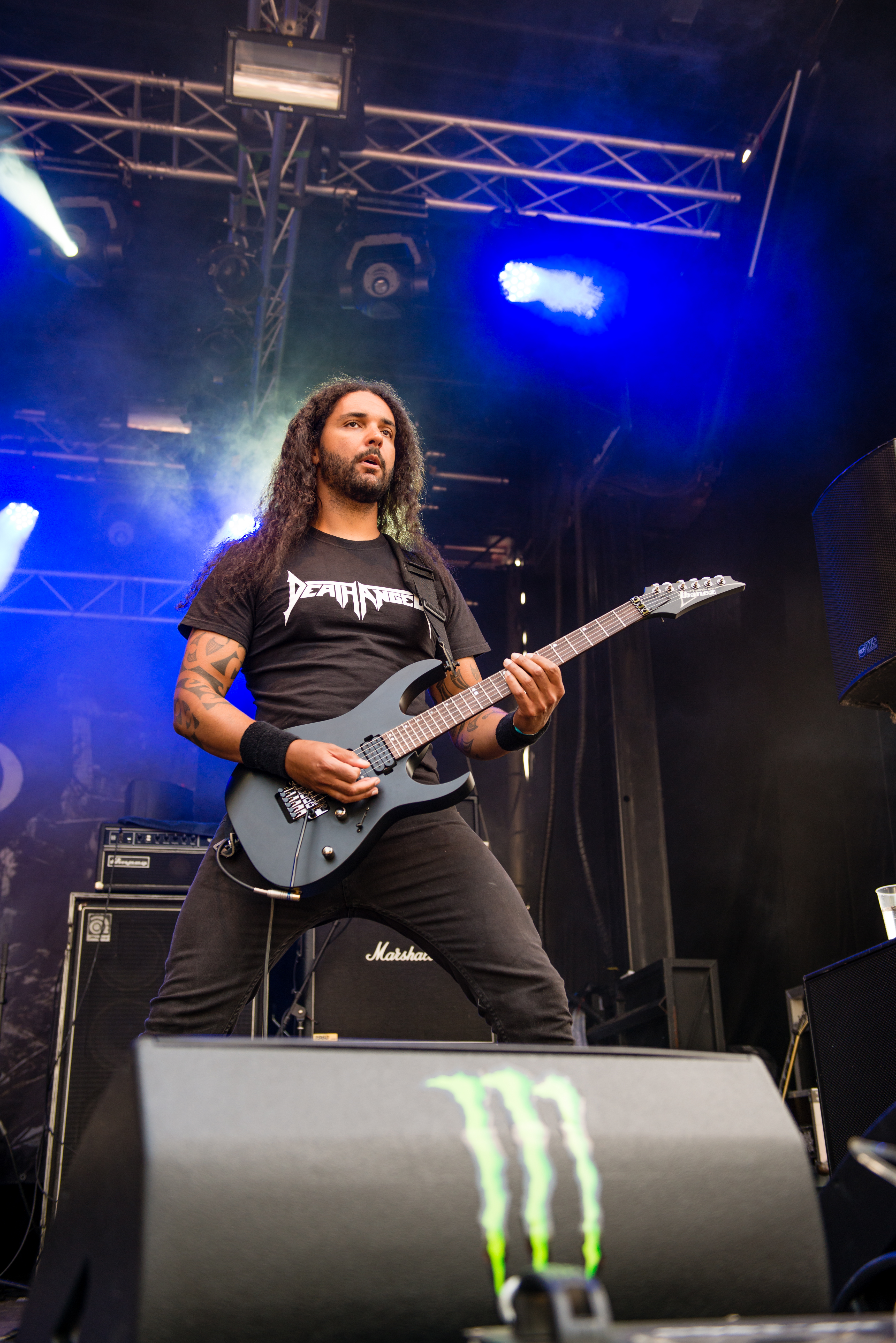 'Nord Open Air 2014 - Essen': 'Dew-Scented'